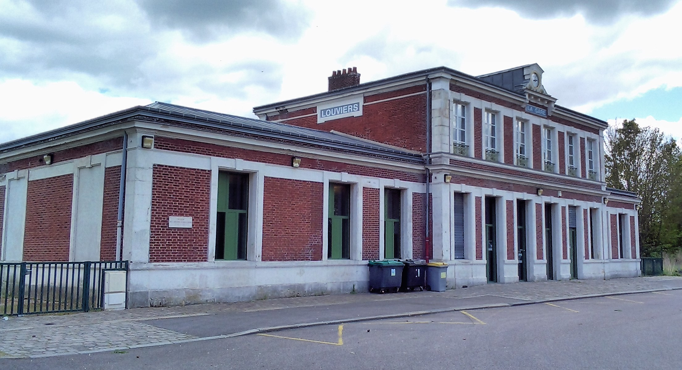 Louviers - ancienne gare. Horloge Biard-Roy.